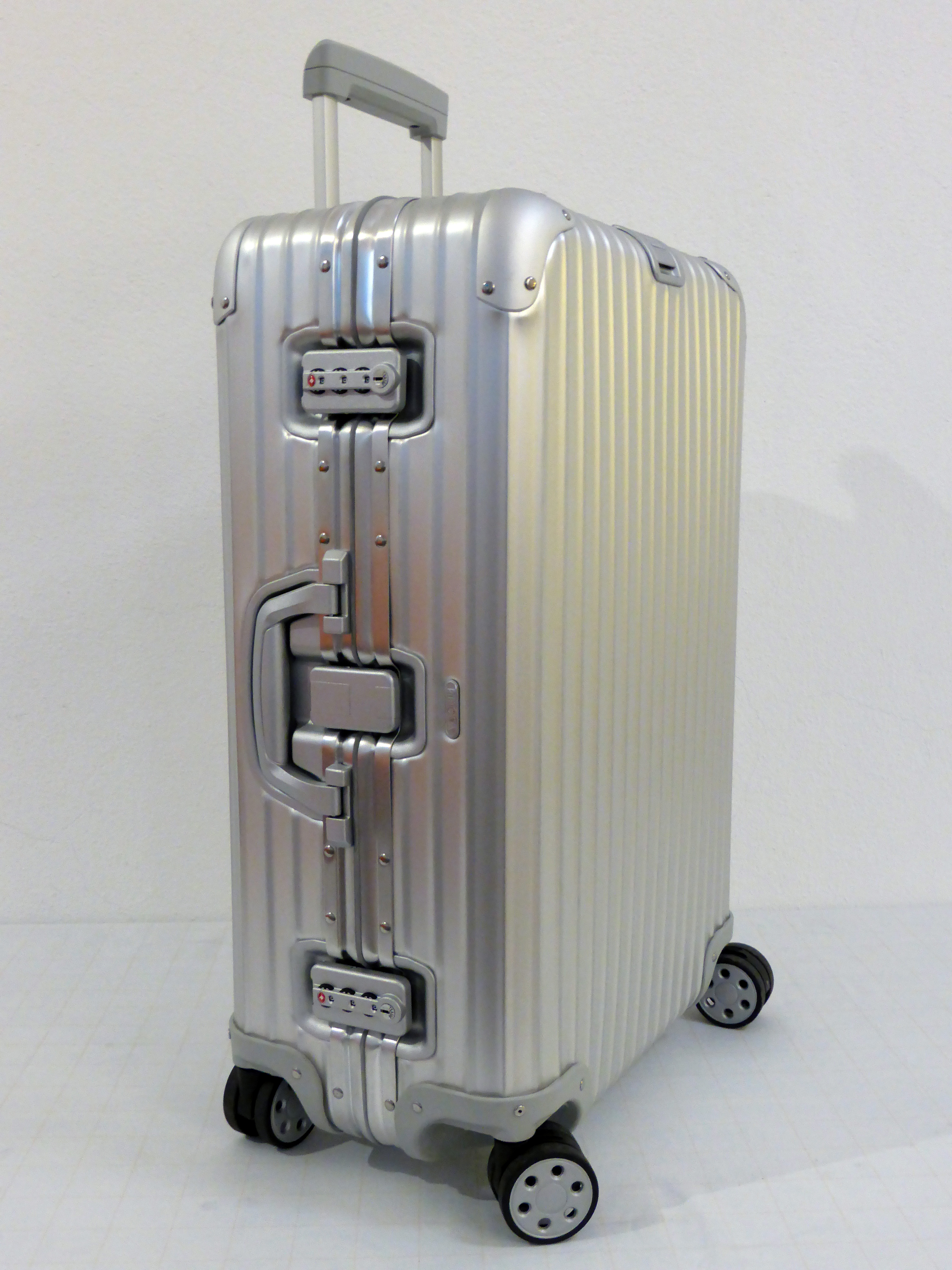 Rimowa-Koffer der Topas-Serie.